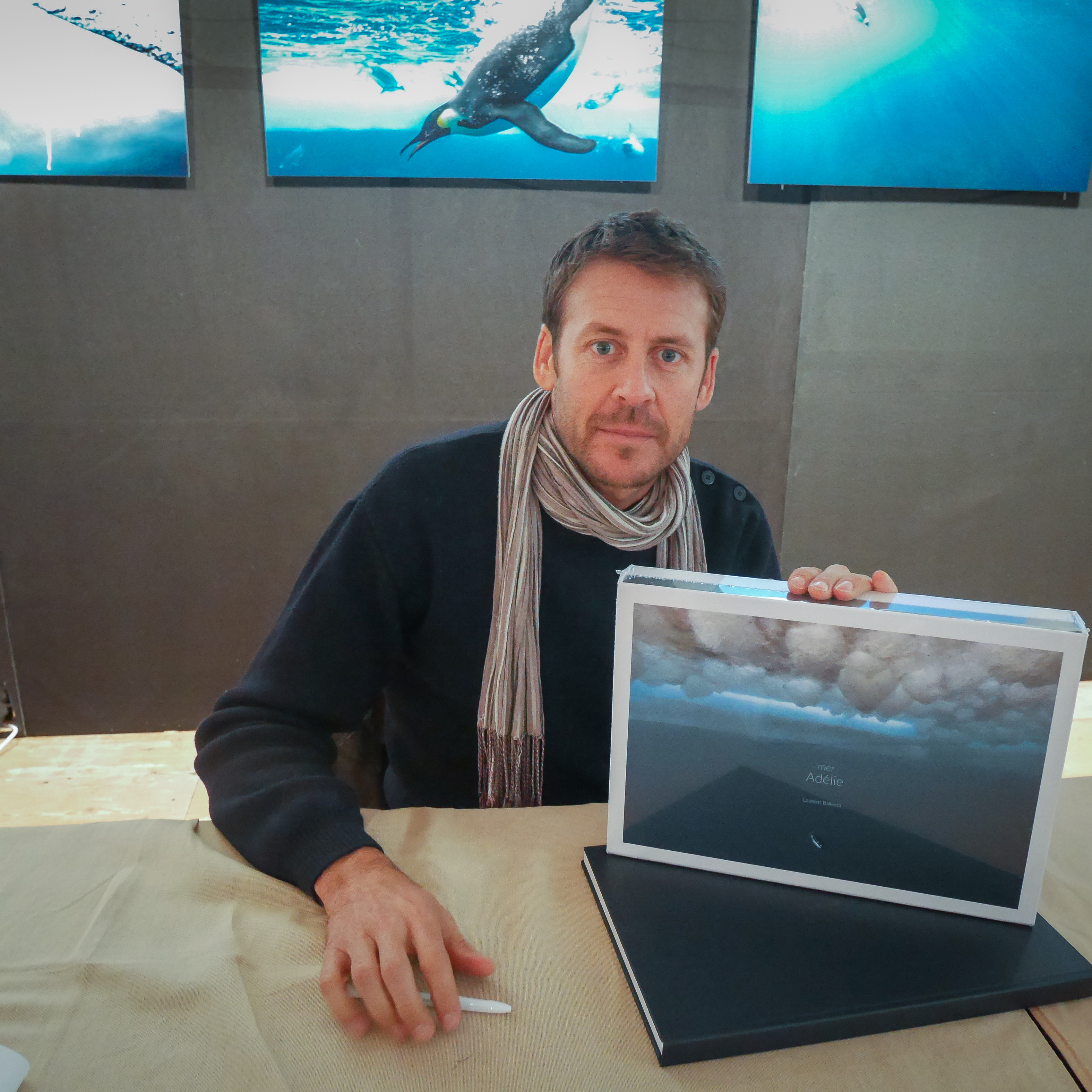 Lors d'une dédicace du coffret "Adélie - Terre & Mer" au Festival international de la photo animalière et de nature de Montier-en-der